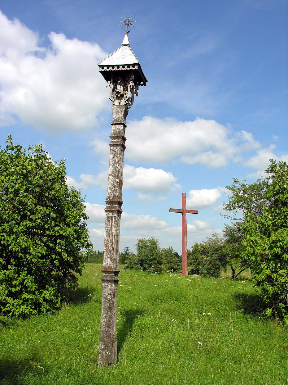 Žemaitėška: Platakē (lt. Platakiai). Platakiū kaima kapēlē. Žemaitėjės naciuonalėnis parks Puortegrapėje Algirda, 2007-08-06, Žemaitėjė